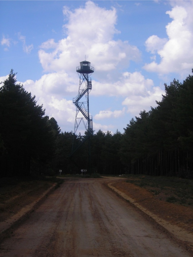 Caseta de vigilancia de incendios del monte de riocamba, en la provincia de León, España.